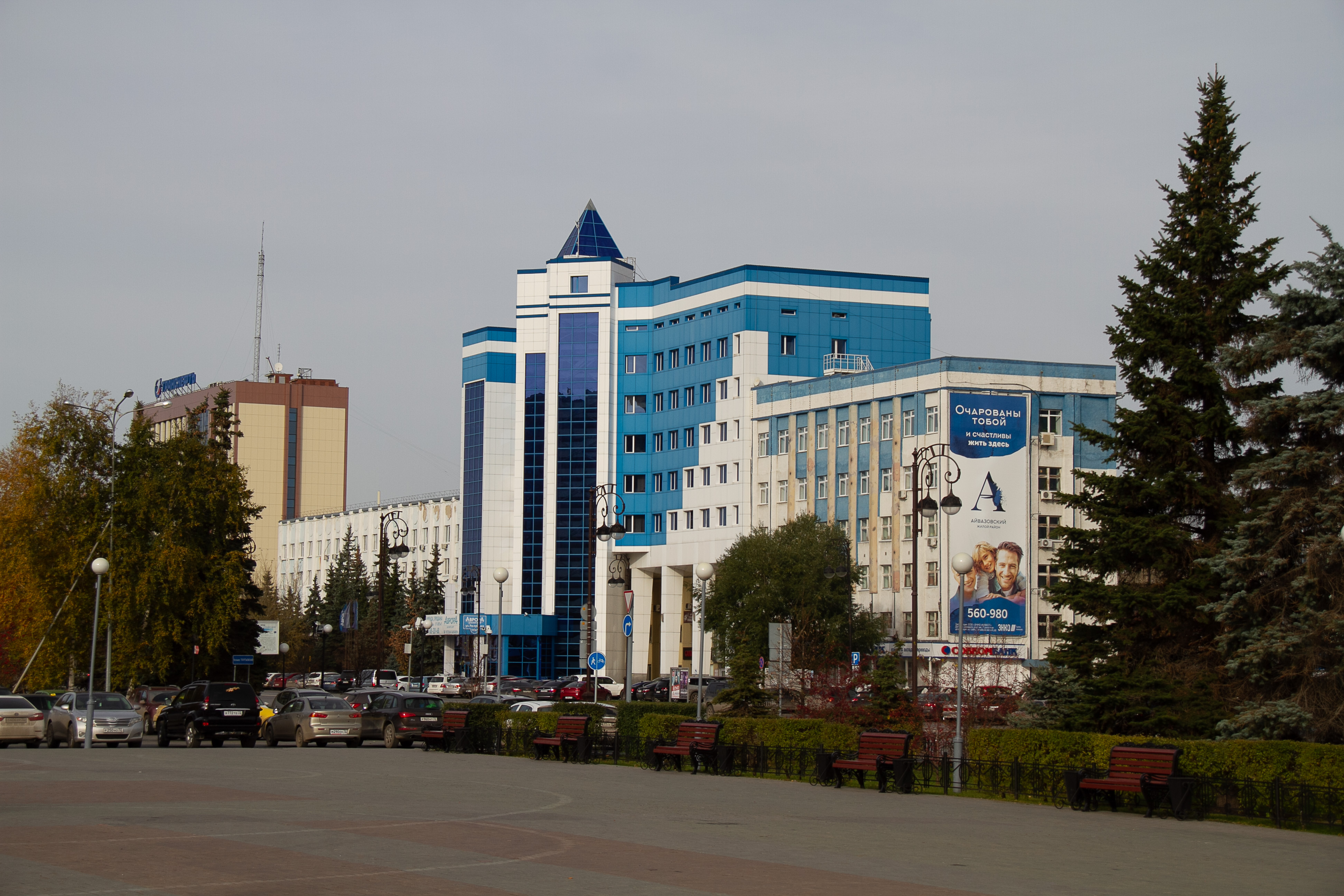 Офисные здания на ул. Республики, г. Тюмень.